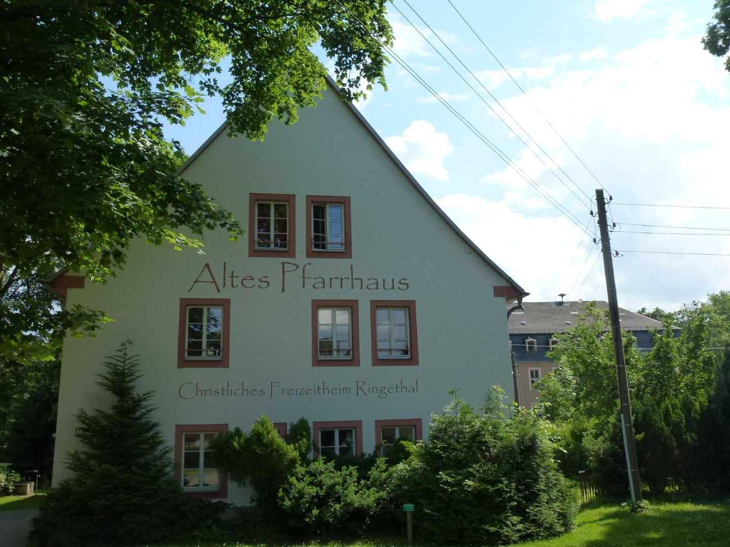 Pfarrhaus in Ringethal, dahinter das Schloss